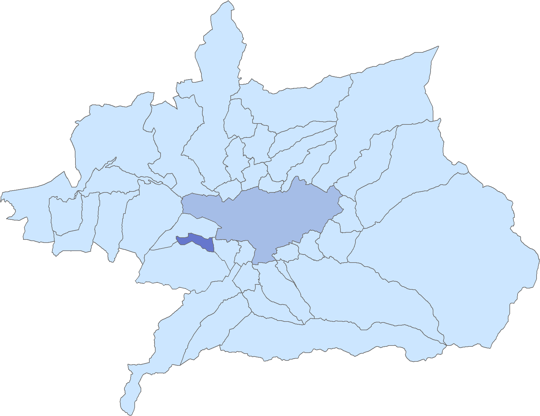 Situación del municipio de Cúllar Vega respecto a la comarca de la Vega de Granada, en España.